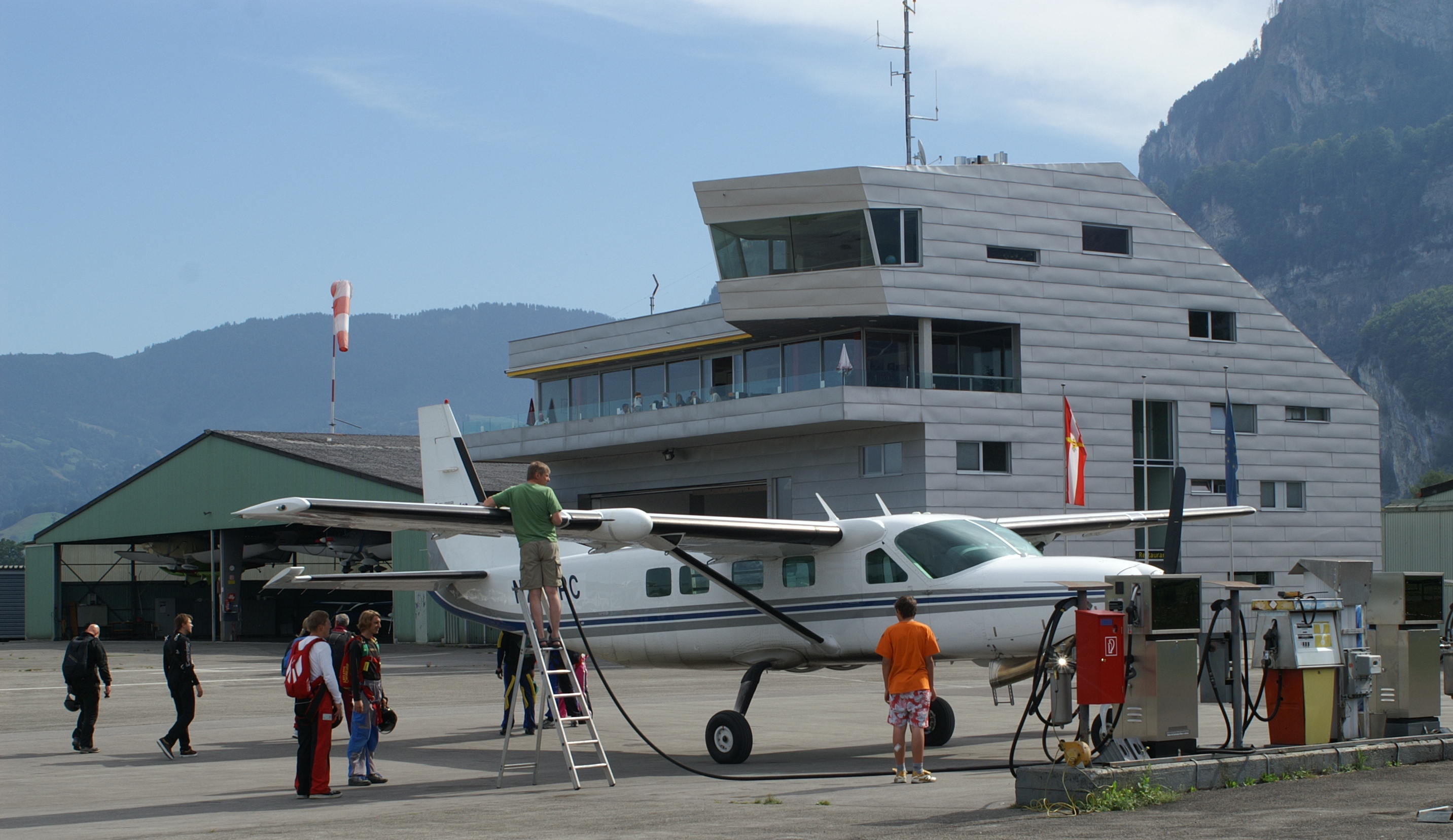 Flughafengebäude mit Tower am Flugplatz Hohenems-Dornbirn in Hohenems, Vorarlberg. Veröffentlicht: Georg Kessler in "Freizeit im Ländle, Die schönsten Ausflugziele in Vorarlberg ISBN 978-3-7022-3068-5 2010.